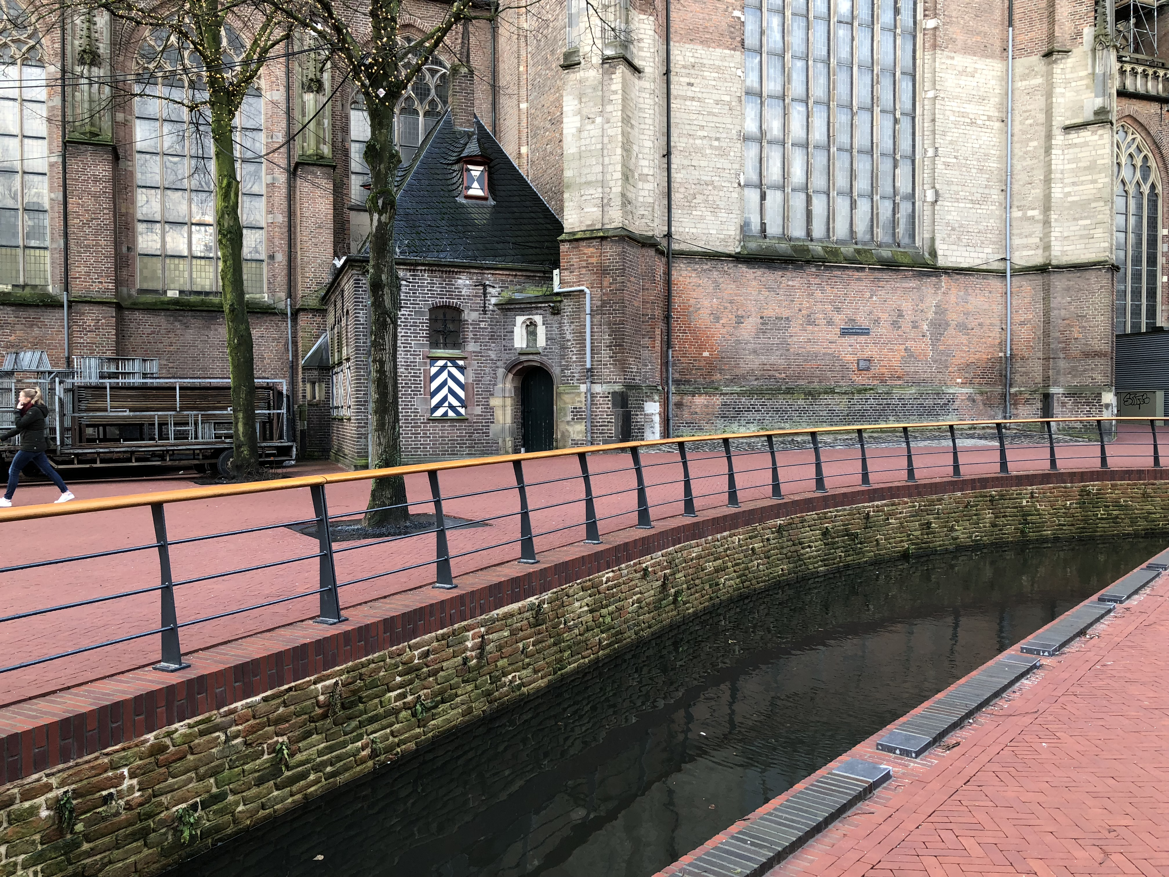 De Sint-Jansbeek op Jonas Daniël Meijerplaats